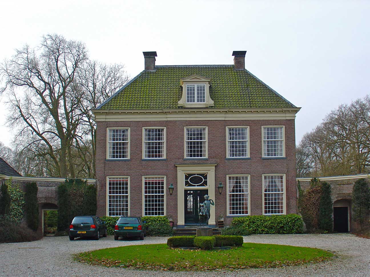 Huize Voorwijk bij de Wijk. RM nummer 529556 (voorheen RM39670)